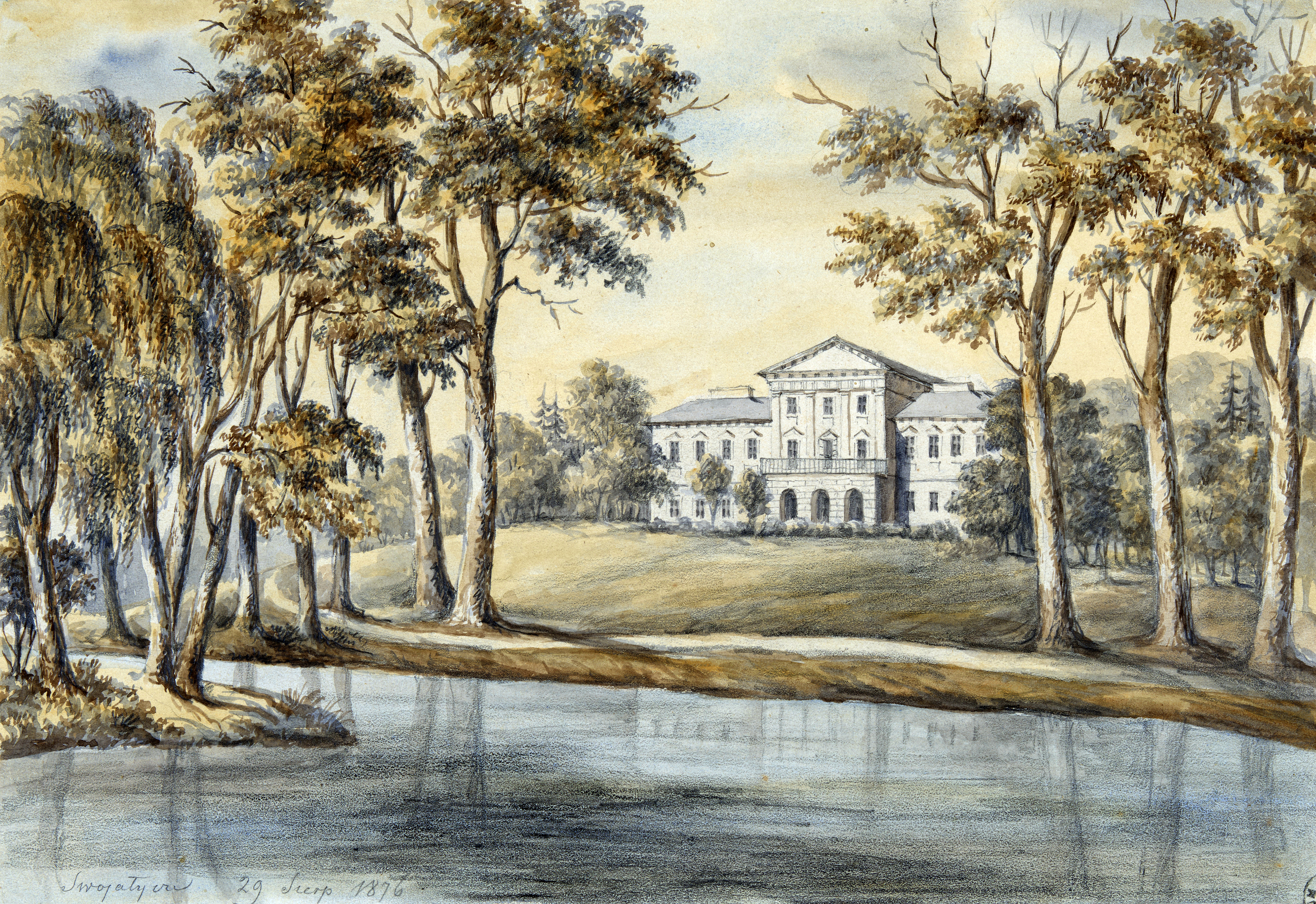 Беларуская (тарашкевіца): Сваятычы (Svajatyčy), сядзіба Чапскіх (Čapski)